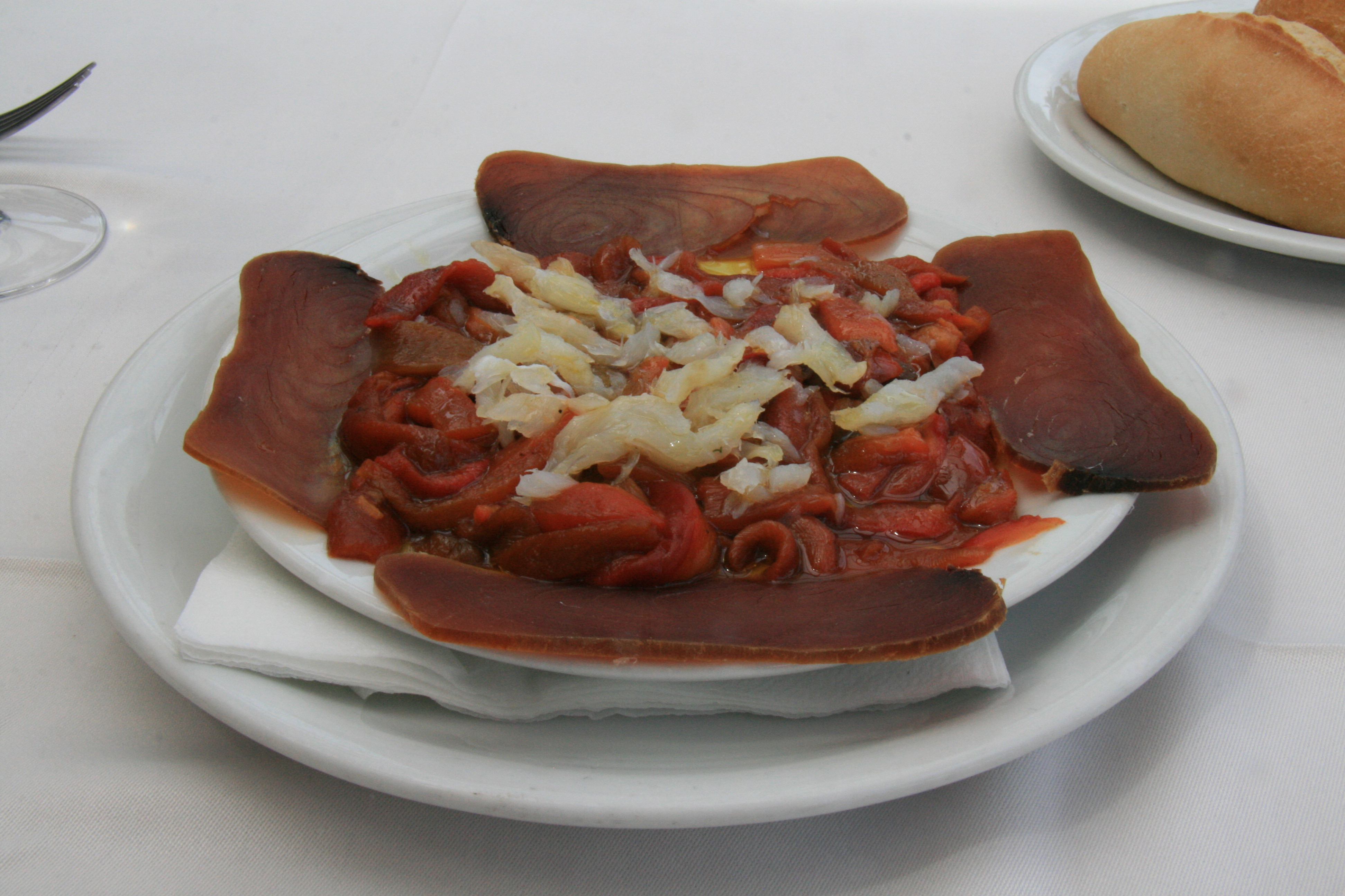 Esgarraet